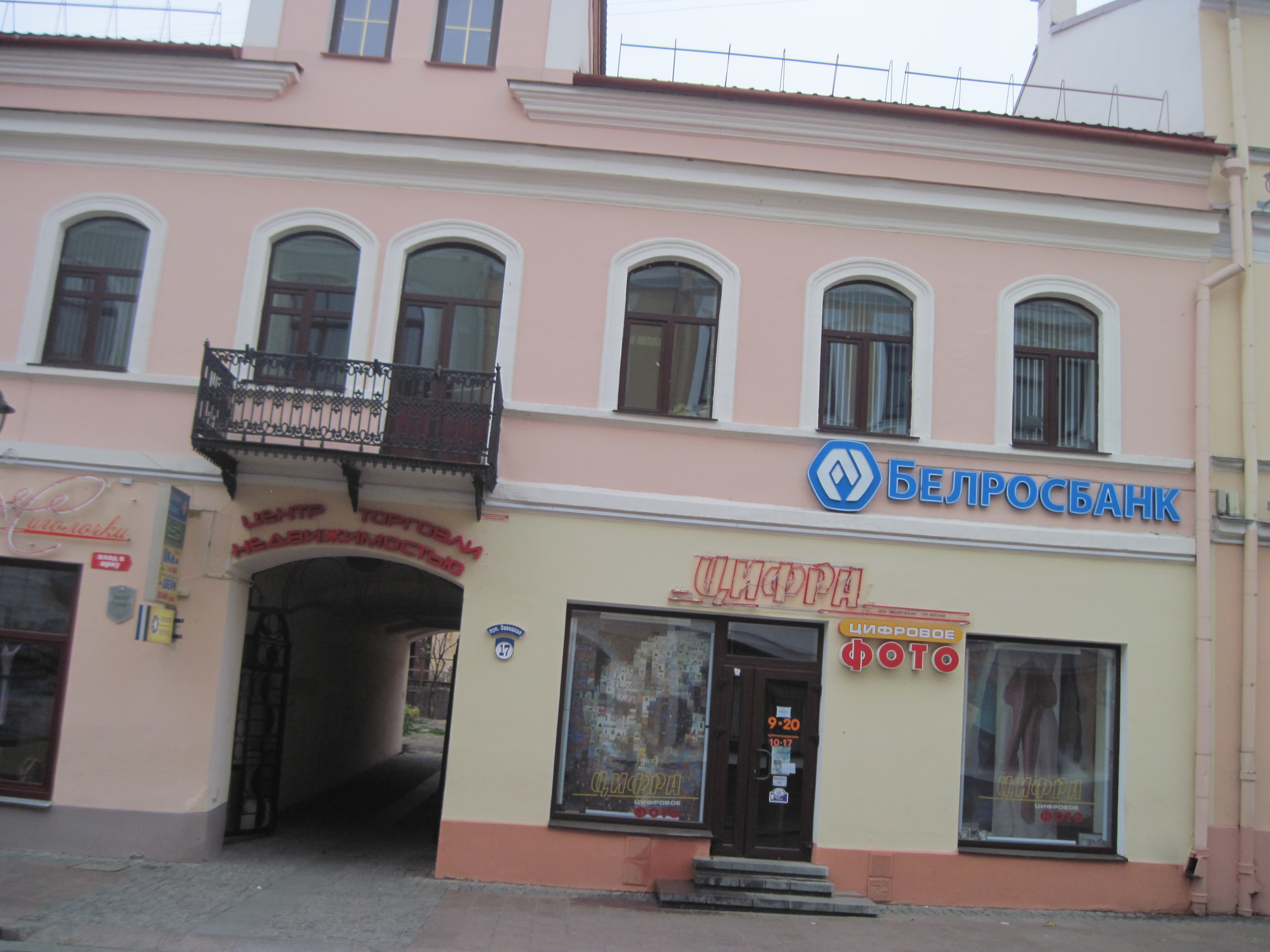 Беларуская (тарашкевіца): Здымак дому № 17 па вул Савецкая, Гродна